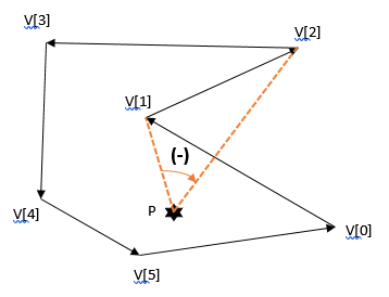 Algoritmo radial. Sentido negativo del ángulo de barrido.